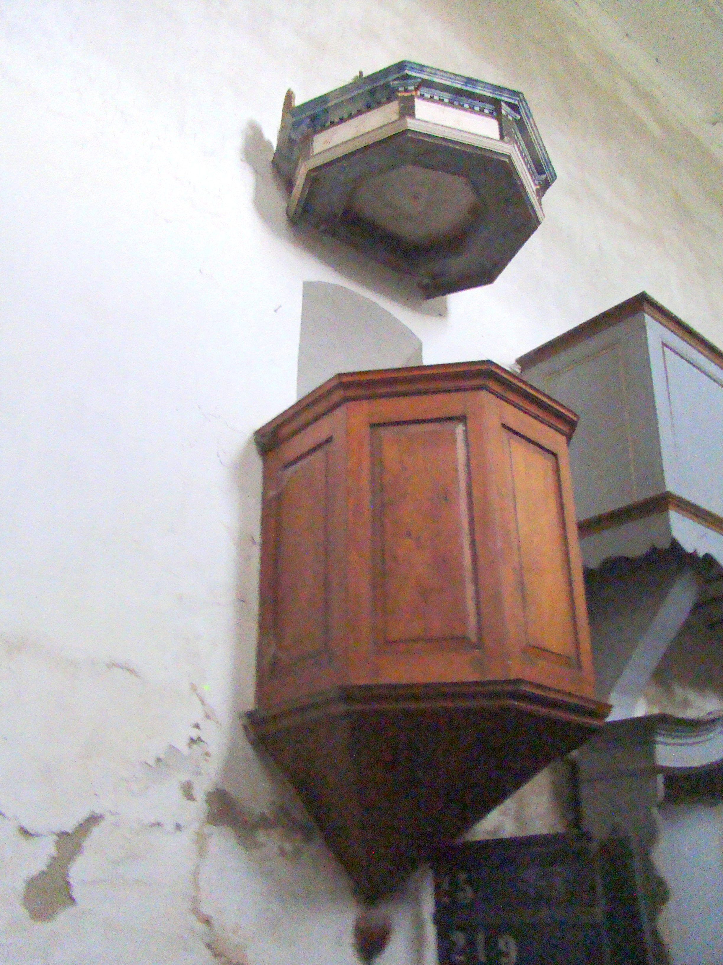 Ansamblul bisericii evanghelice fortificate, sat Mercheașa; comuna Homorod 339 sec. XIII-XIX